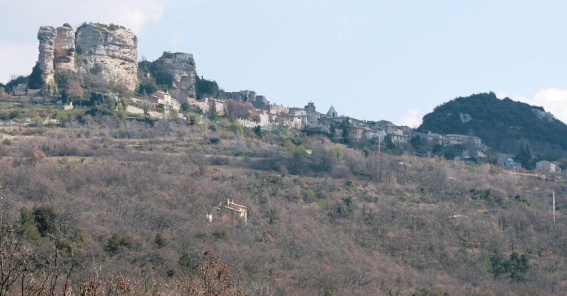 Village of Saignon, Vaucluse, France